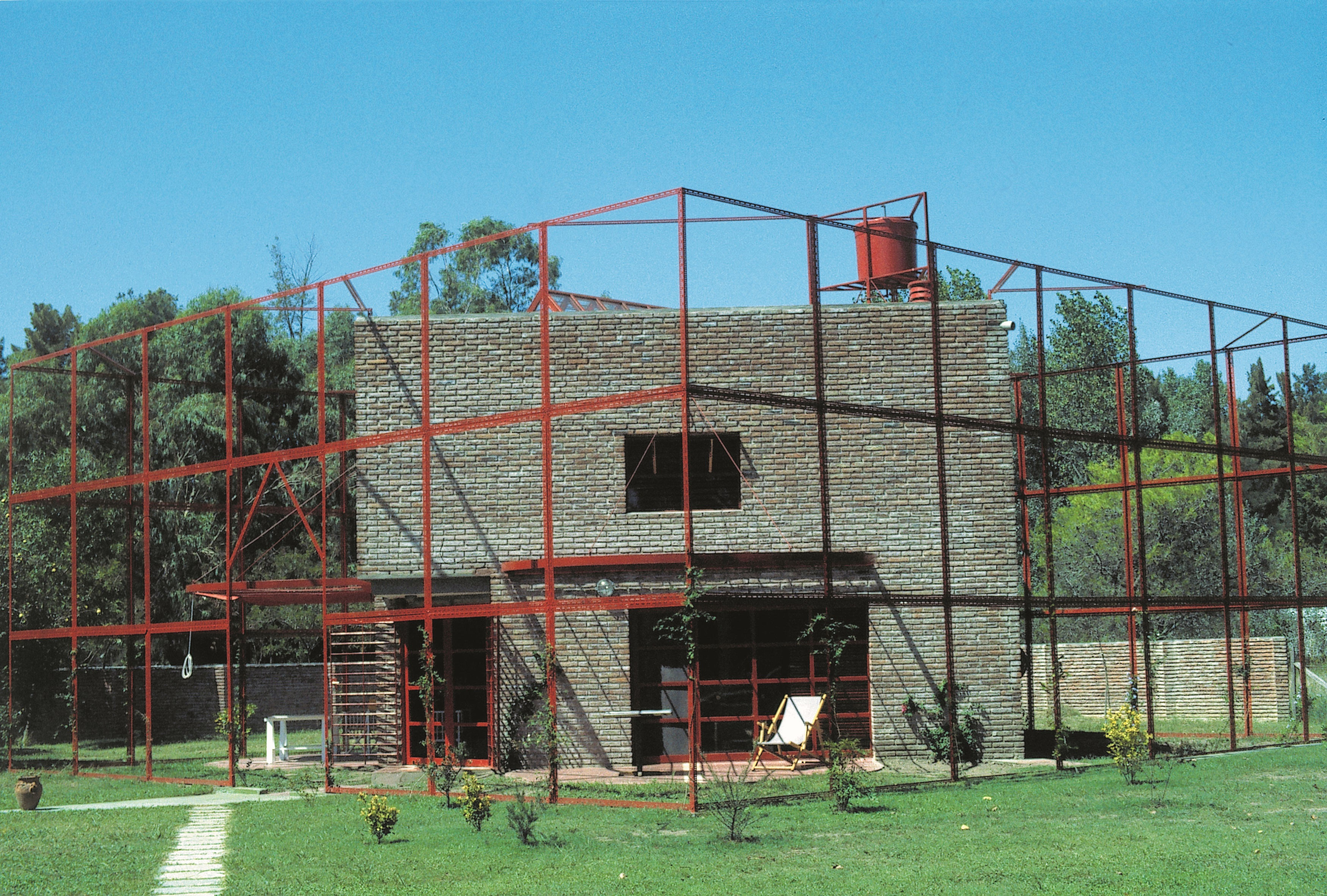 Casa unifamiliar (el proyecto incluye dos casas) diseñada por el arquitecto Tony Diaz y construida en Ingeniero Maschwitz (Buenos Aires, Argentina) en 1978.